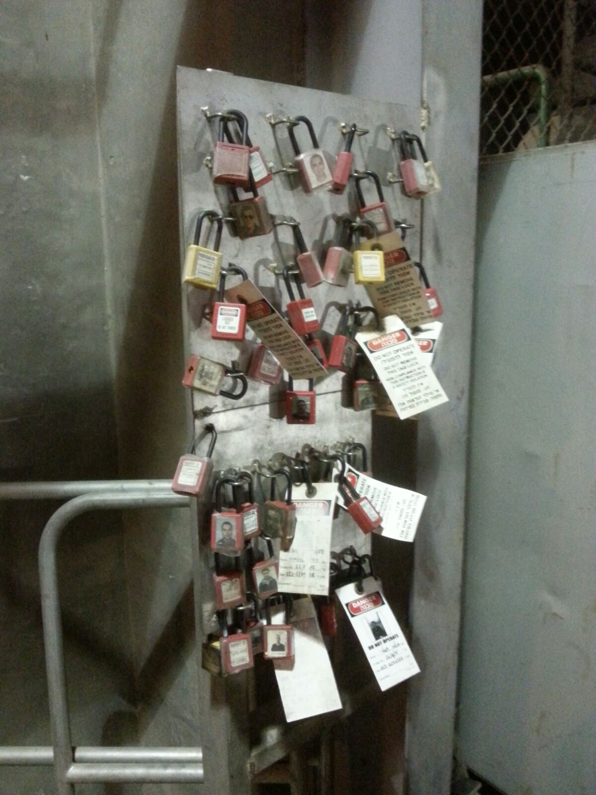 מנעולי בטיחות במוסך הרכבת בלוד